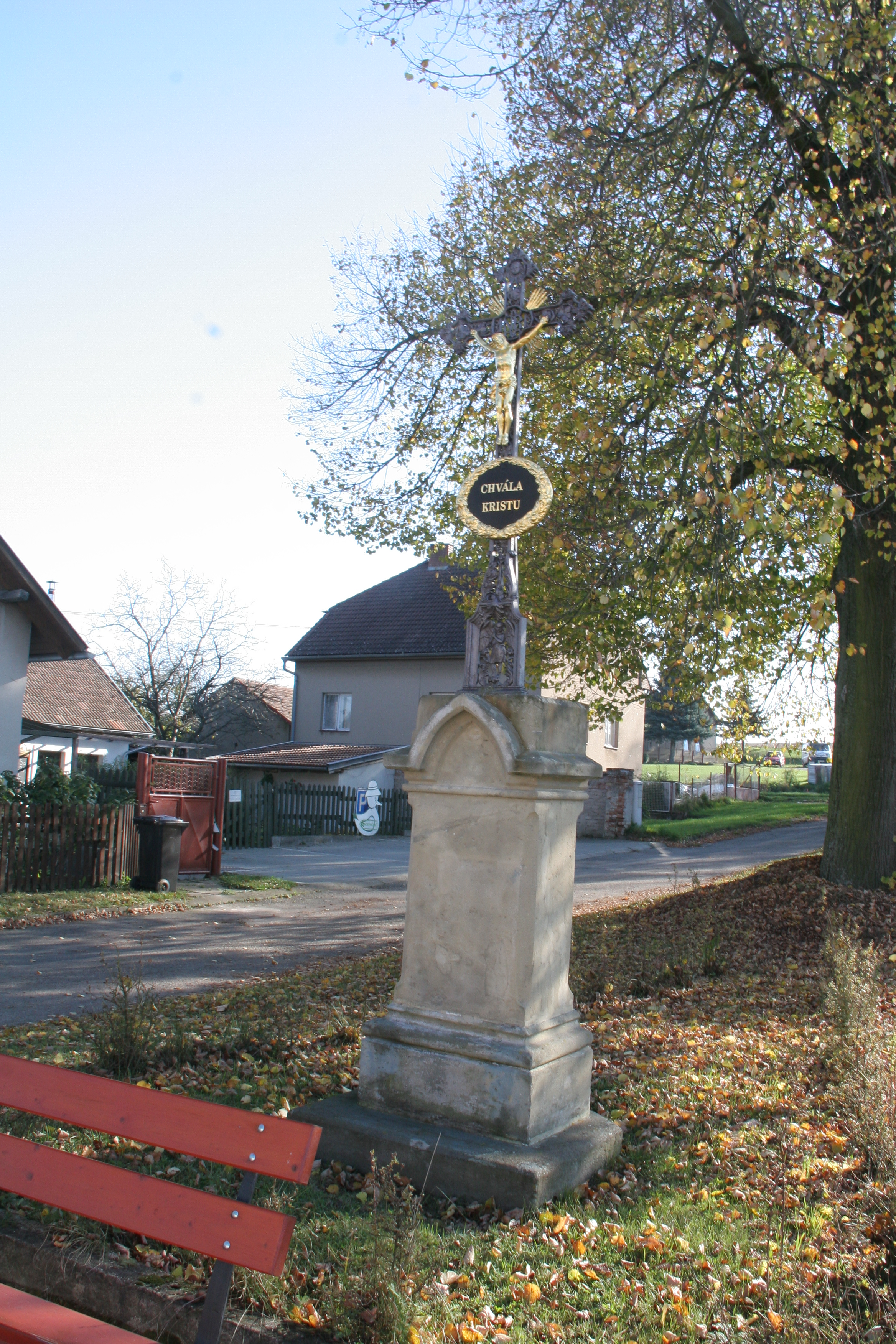 Vysoká u Holic kříž